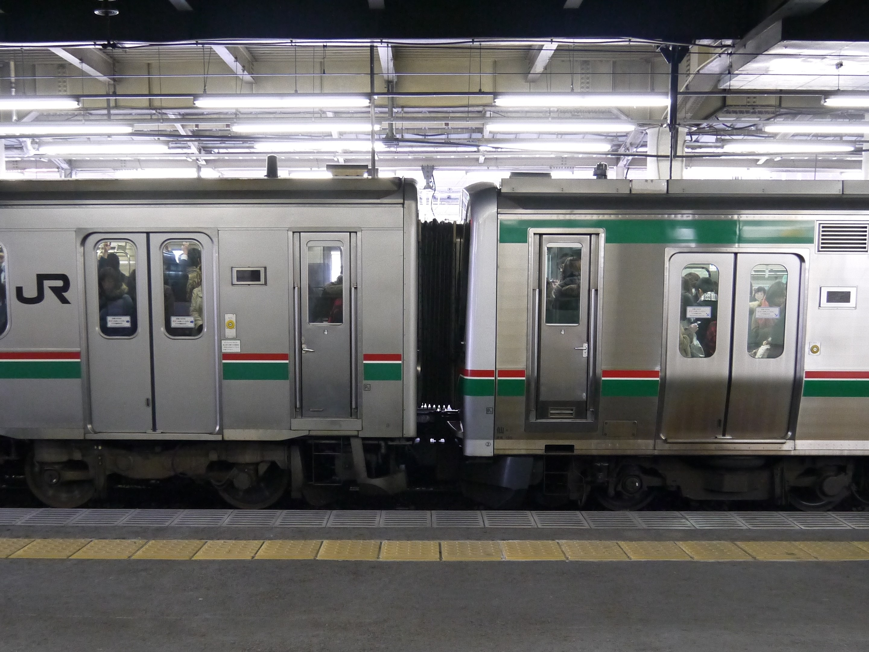 JR東日本 701系車両とE721系車両との併結運転